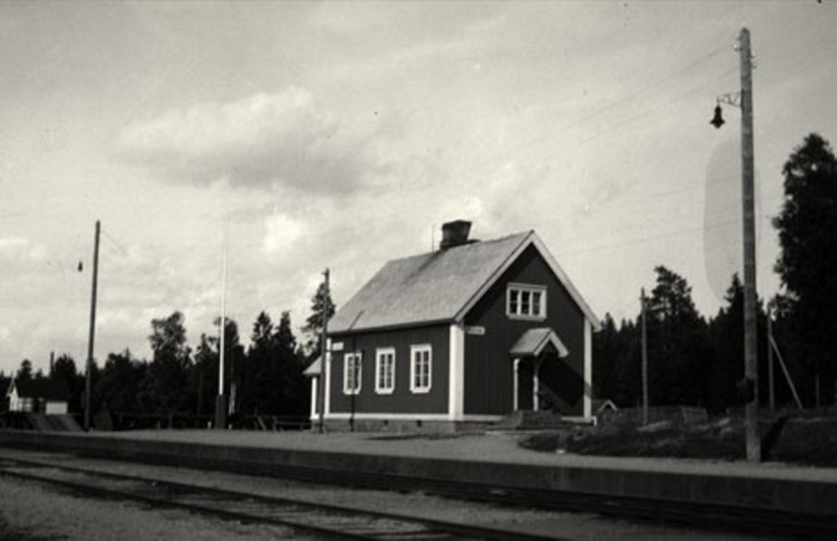 здание вокзала